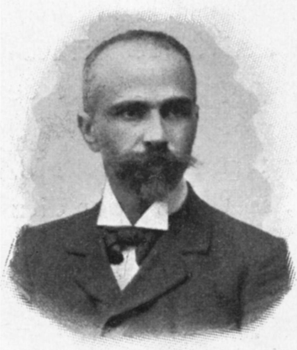 retrato de José María de Basterra y Madariaga, Arquitecto